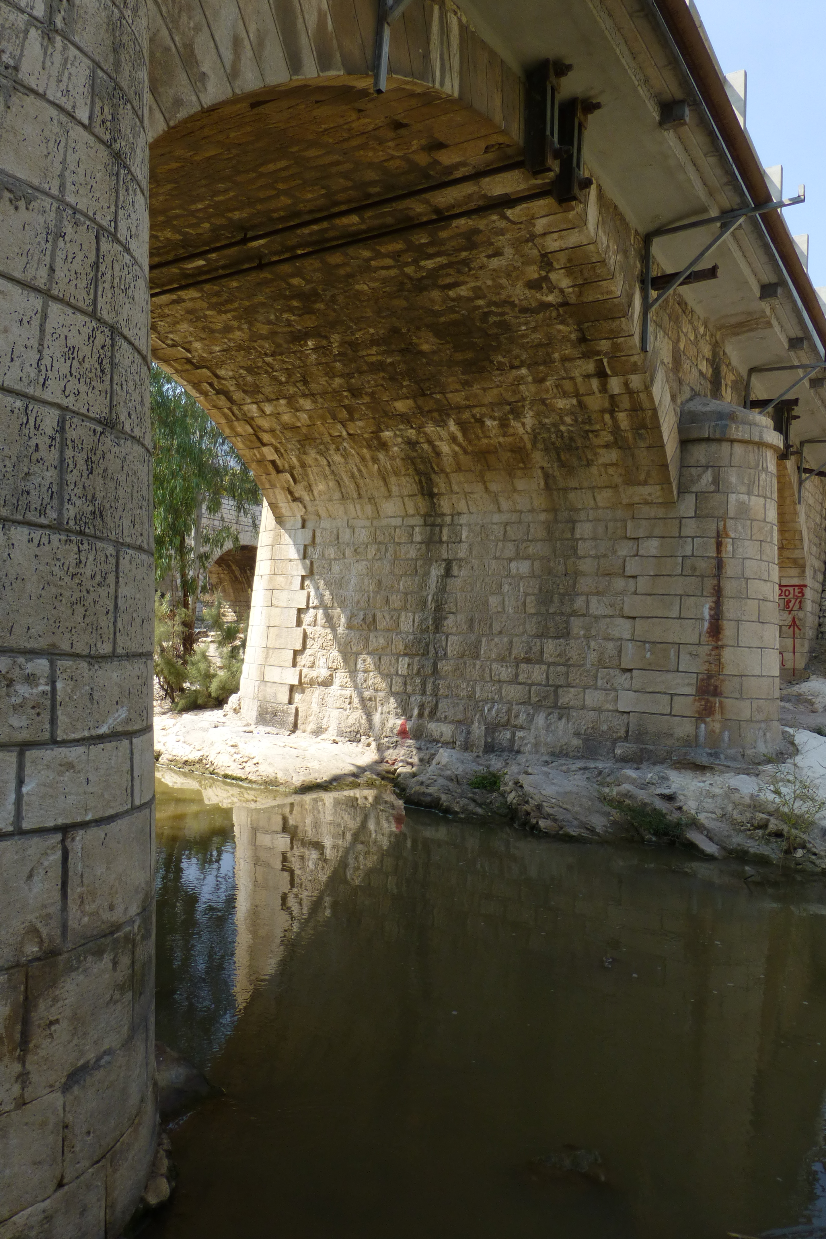 רכבת העמק - מעבירי מים והסוללה - צומת העמקים